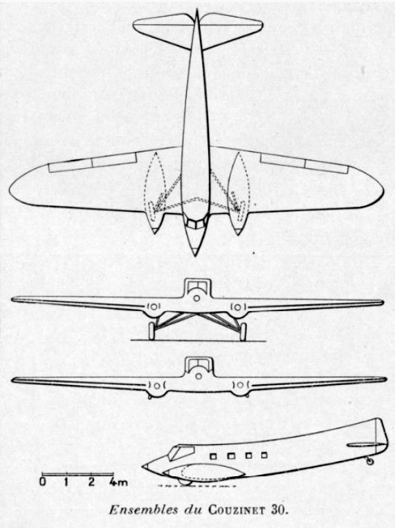 Couzinet 30 (L'Aéronautique, prosinec1930)